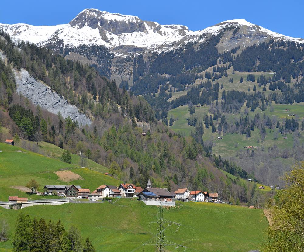 Das Dorf Vasön im Taminatal, Kanton St. Gallen